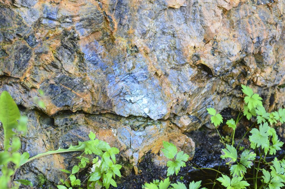 Blåskimrende månestein.